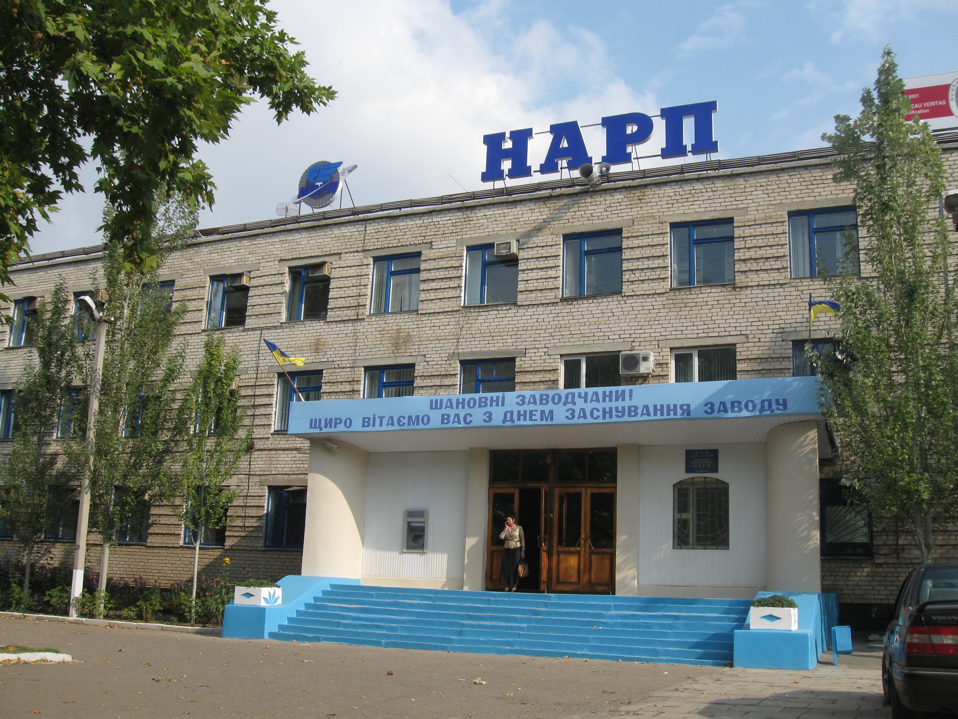 Центральна прохідна Микколаївського Авіа Ремонтного Заводу